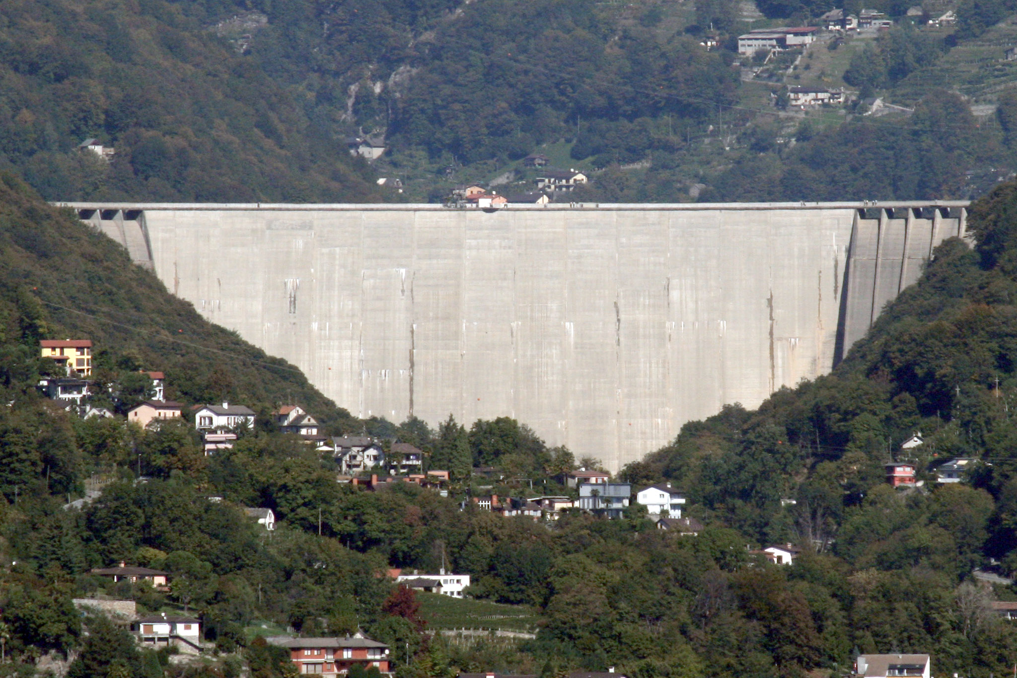 Lago di Vogorno, Valle Verzasca, Switzerland